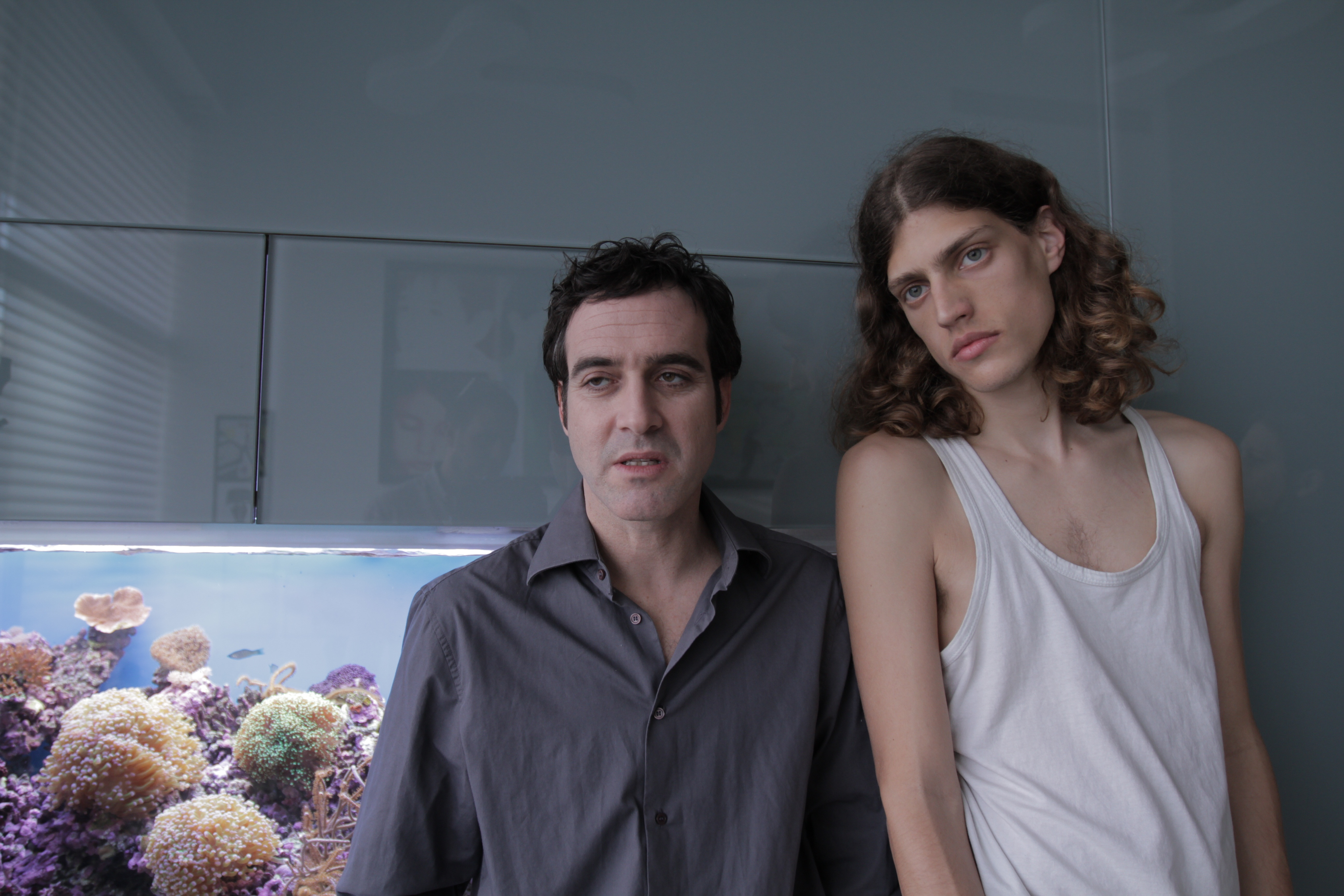 ברק פרידמן וזהר שטראוס